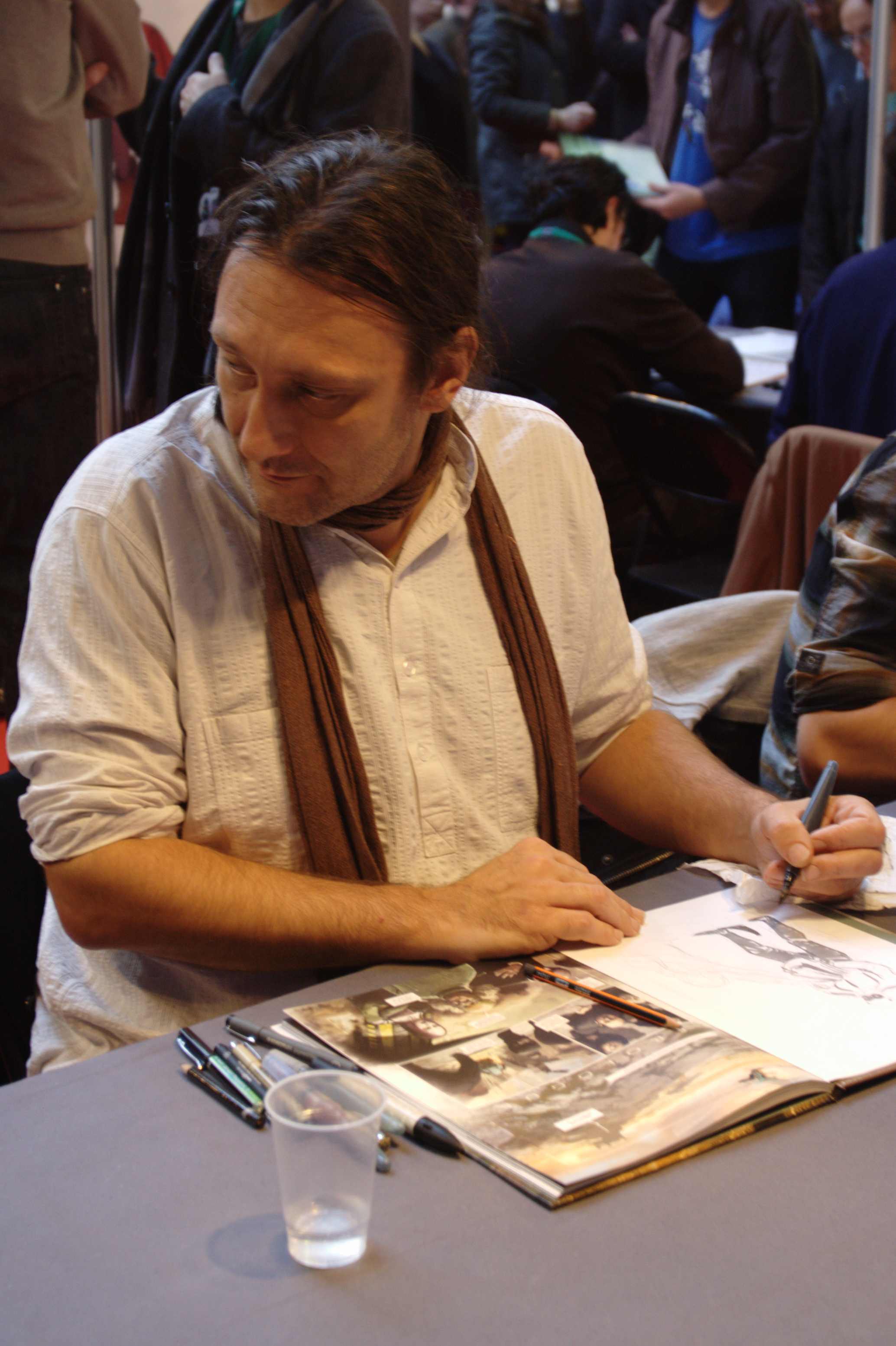 Nicolas Fructus lors de Quai des Bulles à Saint-Malo le 27 octobre 2012.